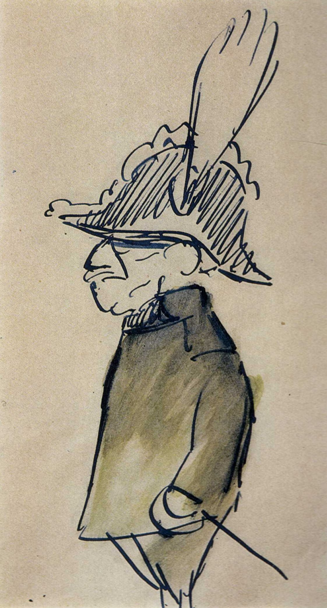 Caricatura scanner of old magazine